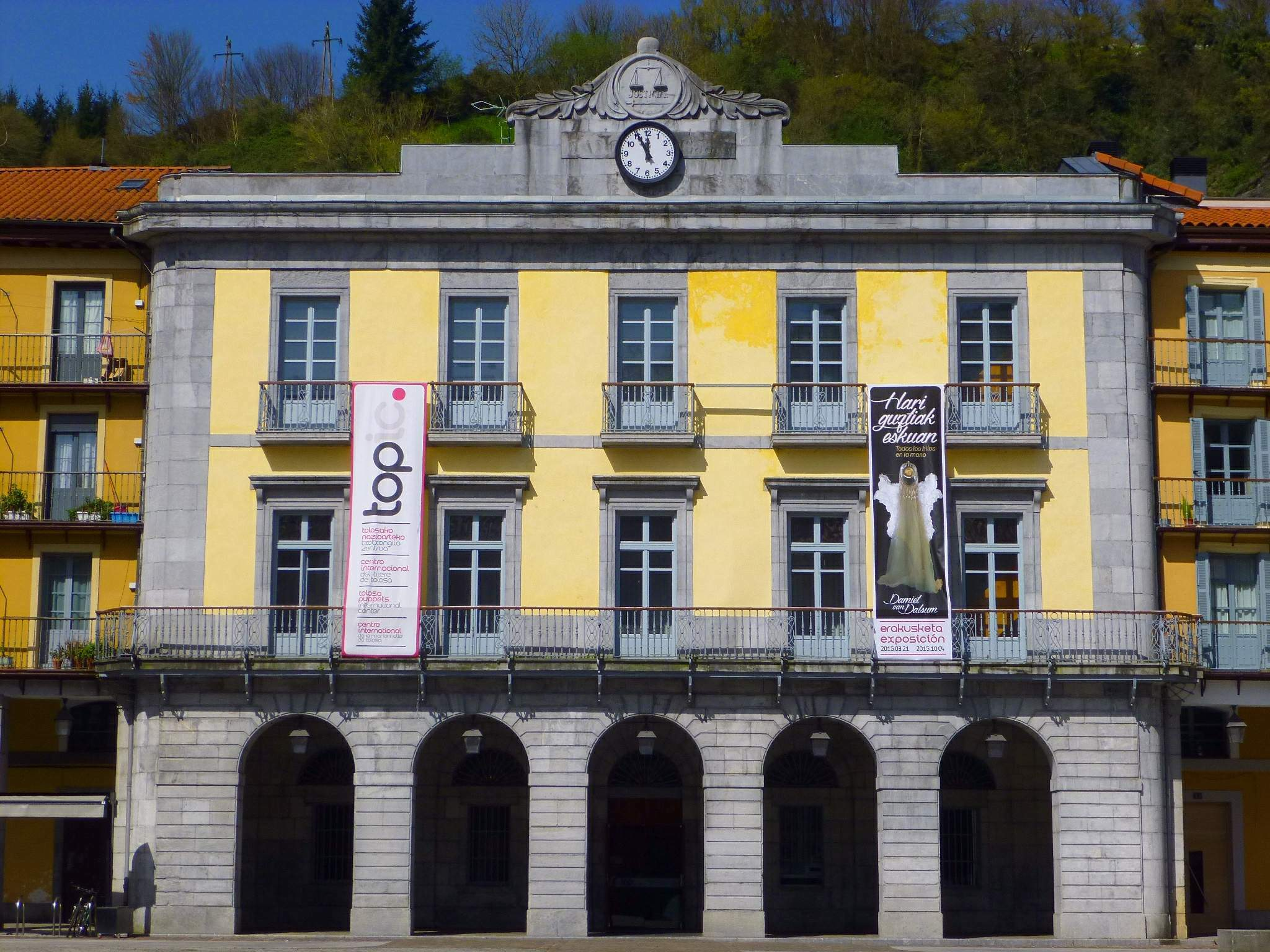 Plaza Euskal Herria (Tolosa)